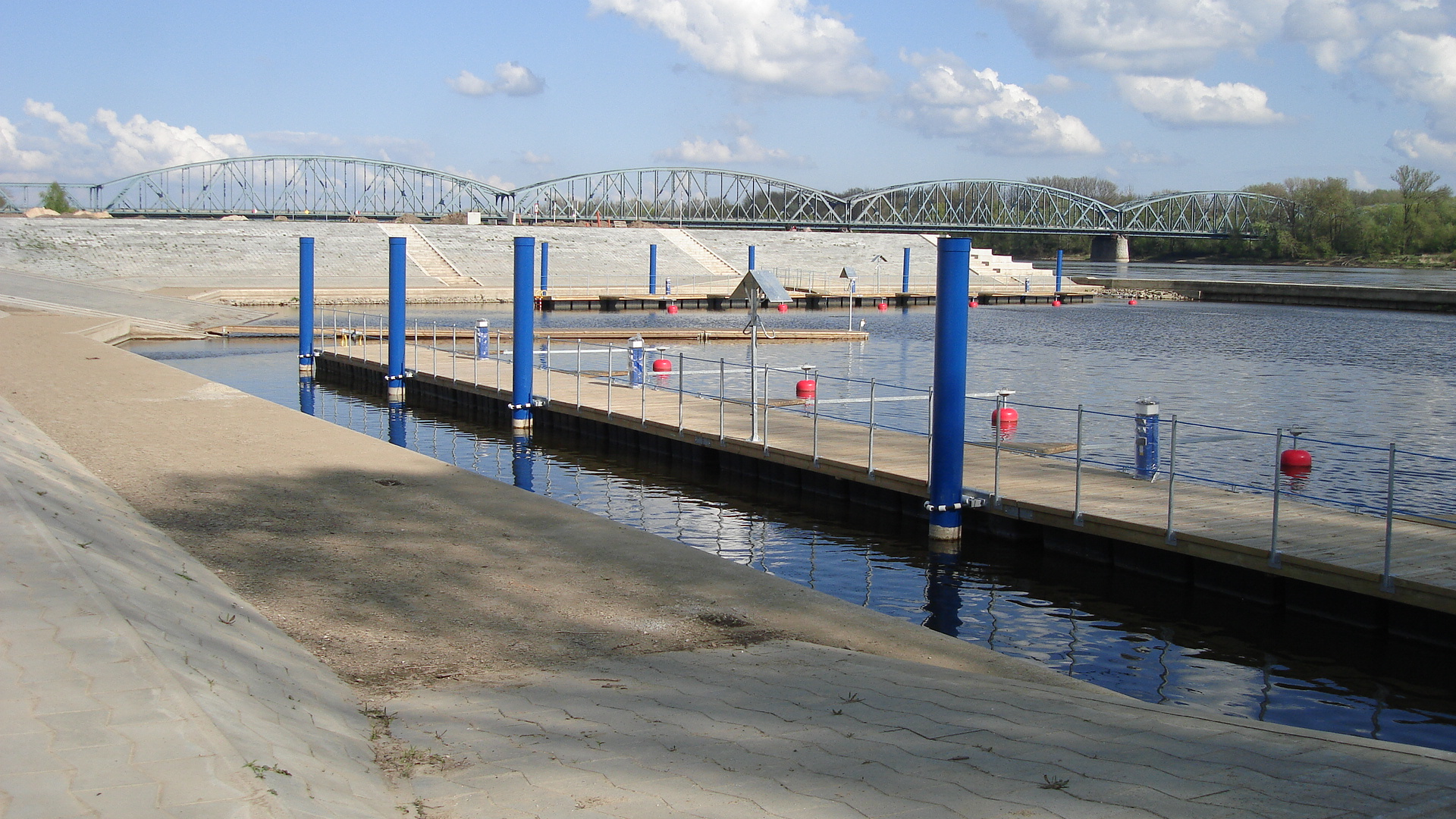 Przystań AZS - Toruń5